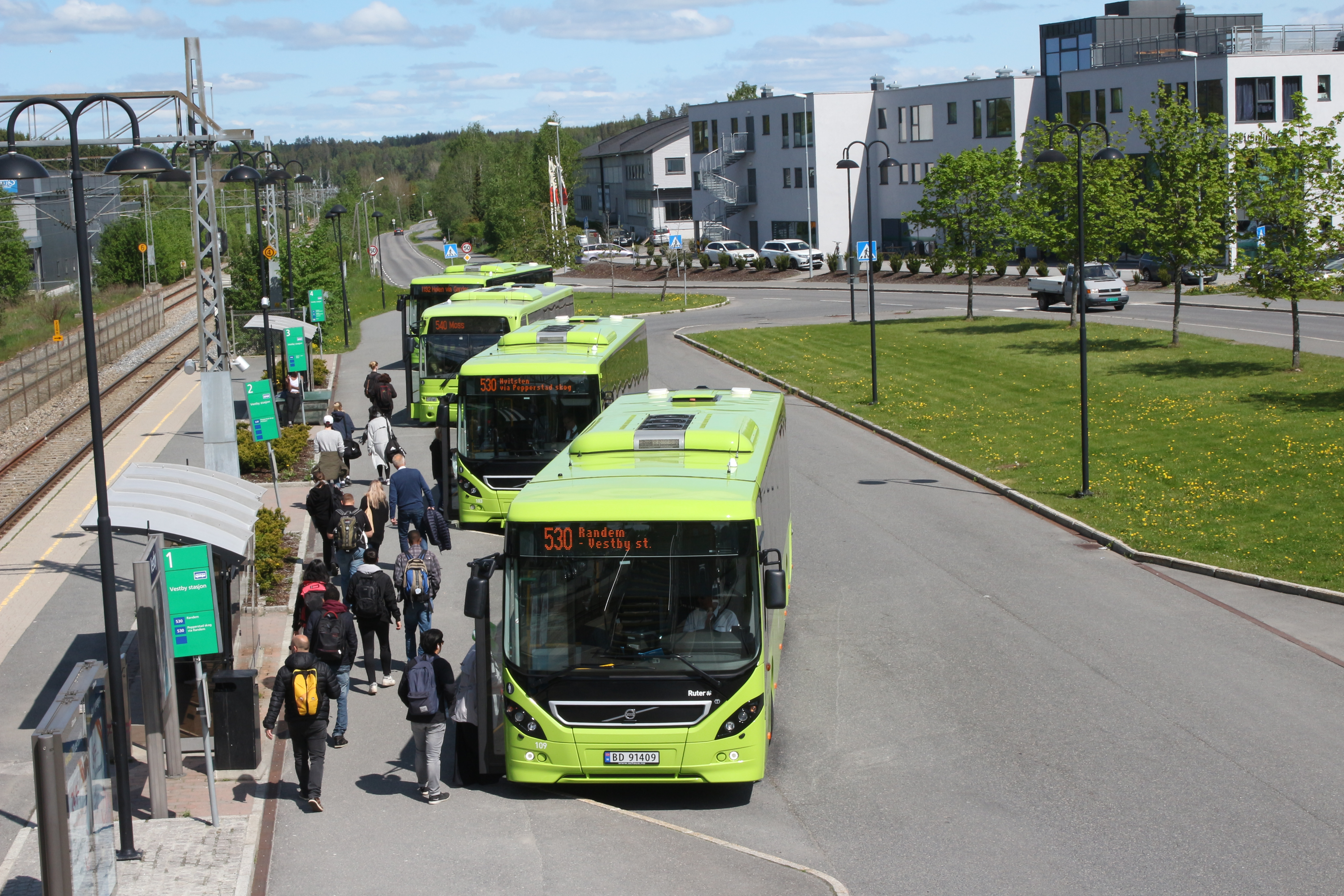 Fire busser fra Schaus Buss ved Vestby stasjon.